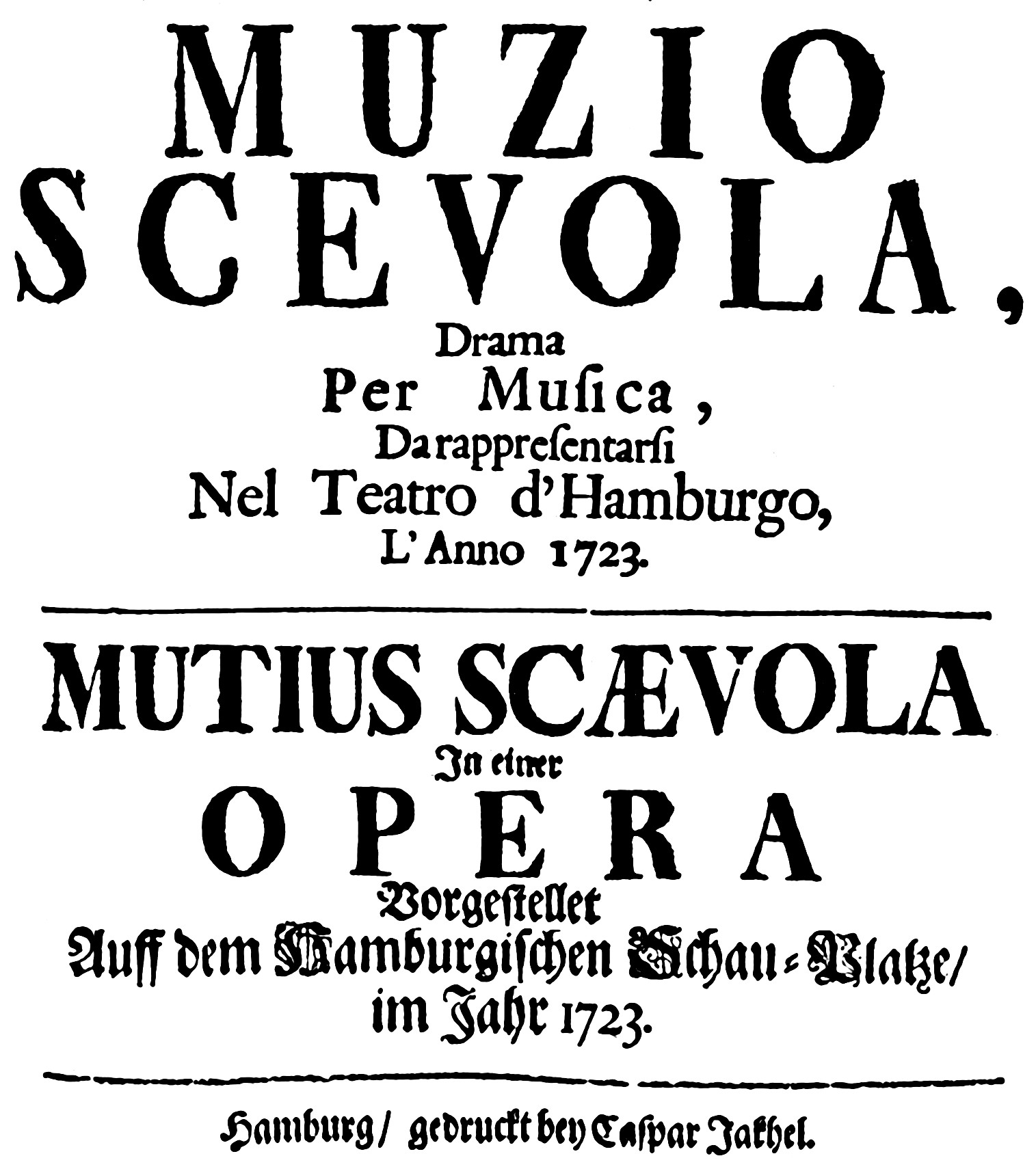 Titelseite des Librettos der Hamburger Aufführungen von Muzio Scevola, 1723